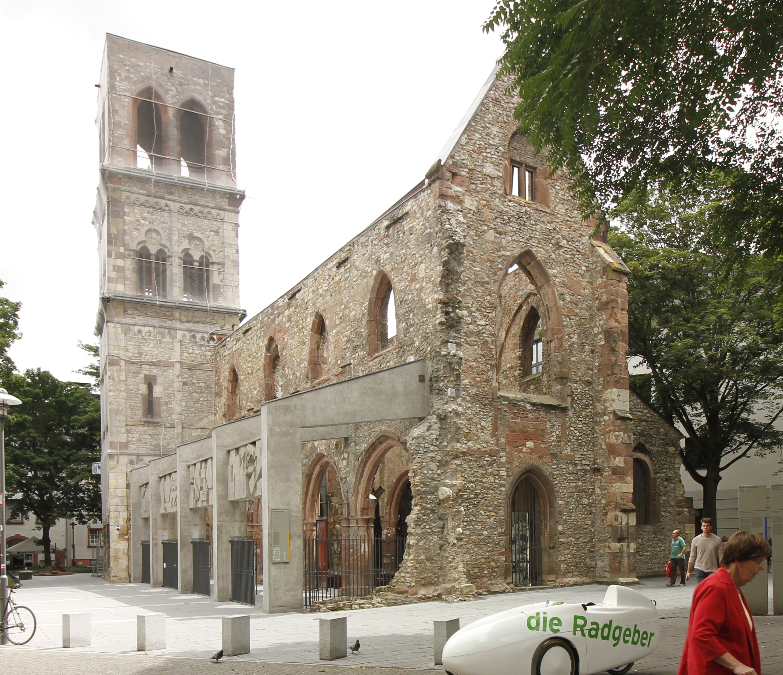 St. Christoph - Mainz - Germany